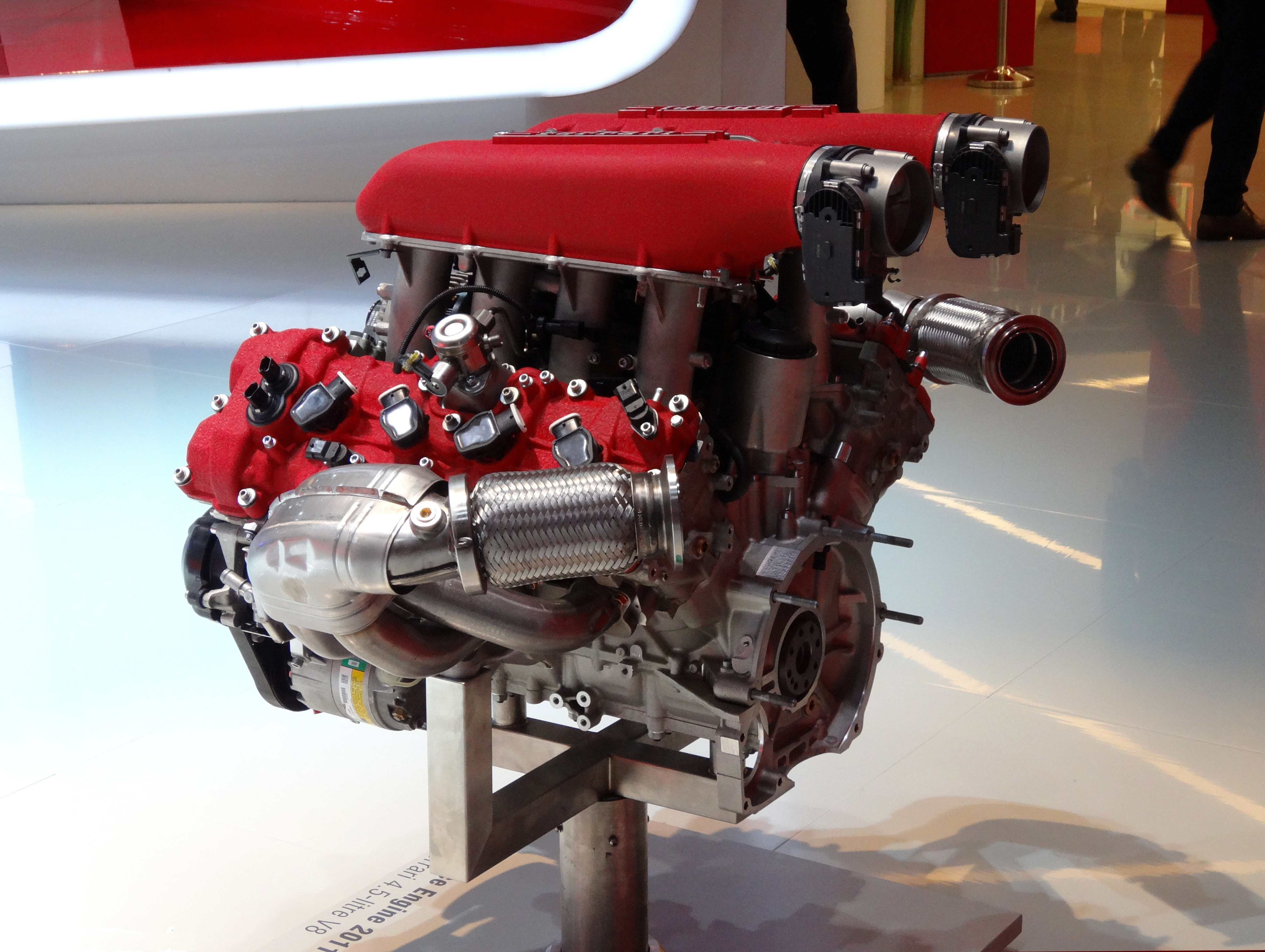 Ferrari 458 Italia 4.5 '11